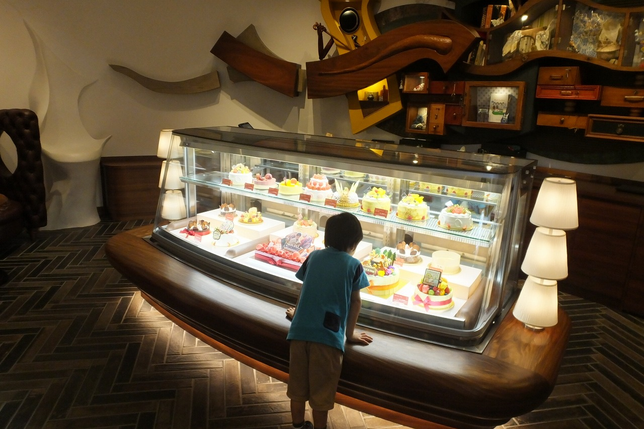 PATISSIER eS koyama - 夢先案内会社 FANTASY DIRECTOR（ファンタジー・ディレクター） パティシエ エス コヤマ 小山進